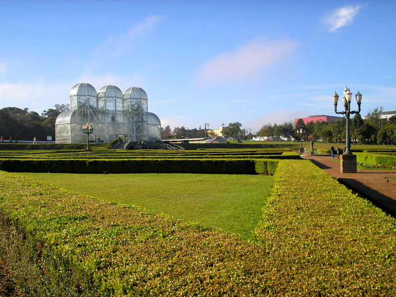 Jardim Botânico de Curitiba, PR, Sul do Brasil.